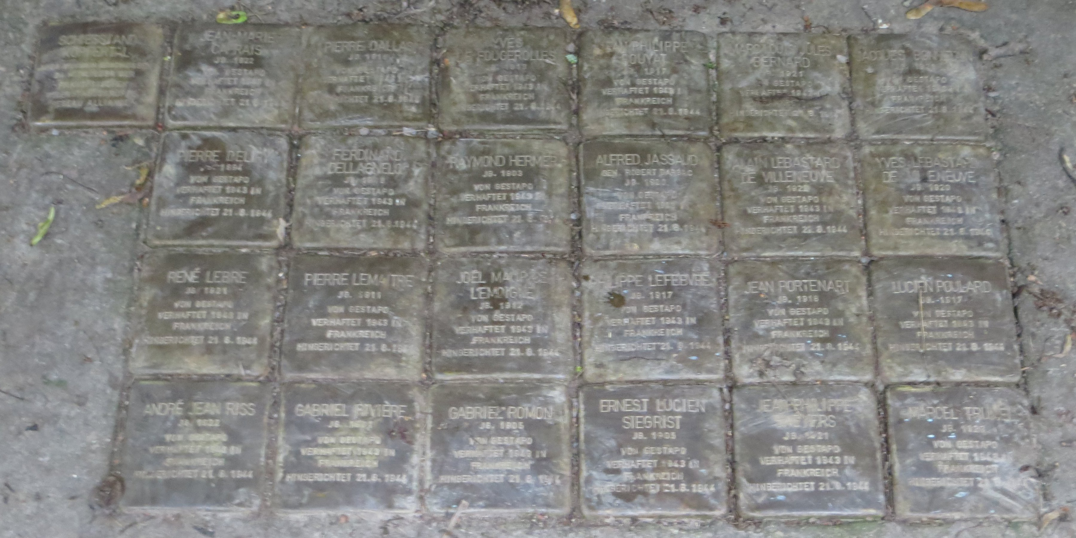 Stolpersteine für am 21. August 1944 hingerichtete französische Widerstandskämpfer im Heilbronner Stadtwald (zwischen Waldschänke und Köpfer-Stausee)